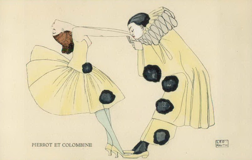 Pierrot und Colombine